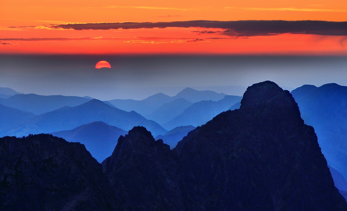 RYSY